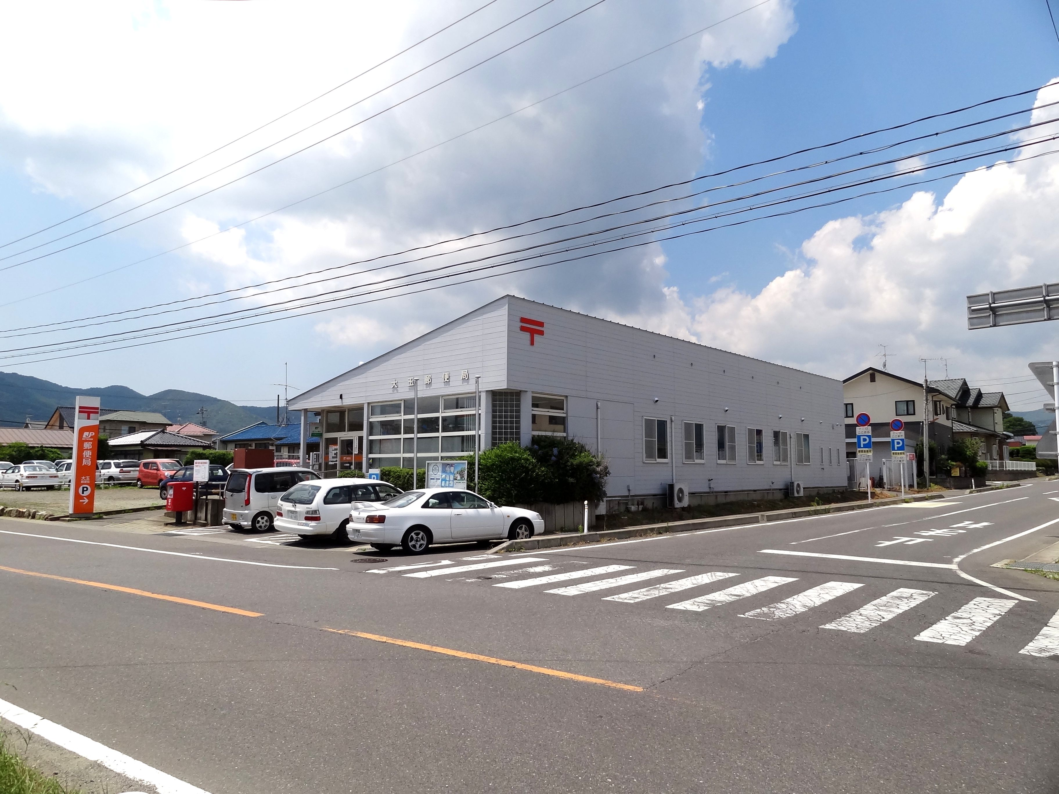 大玉郵便局